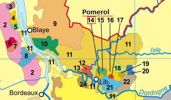 Bildbeschreibung: Karte Weinbaugebiet Bordeaux * Quelle: selbst erstellt * Zeichner: Domenico-de-ga * Datum: 24. Mai 2006